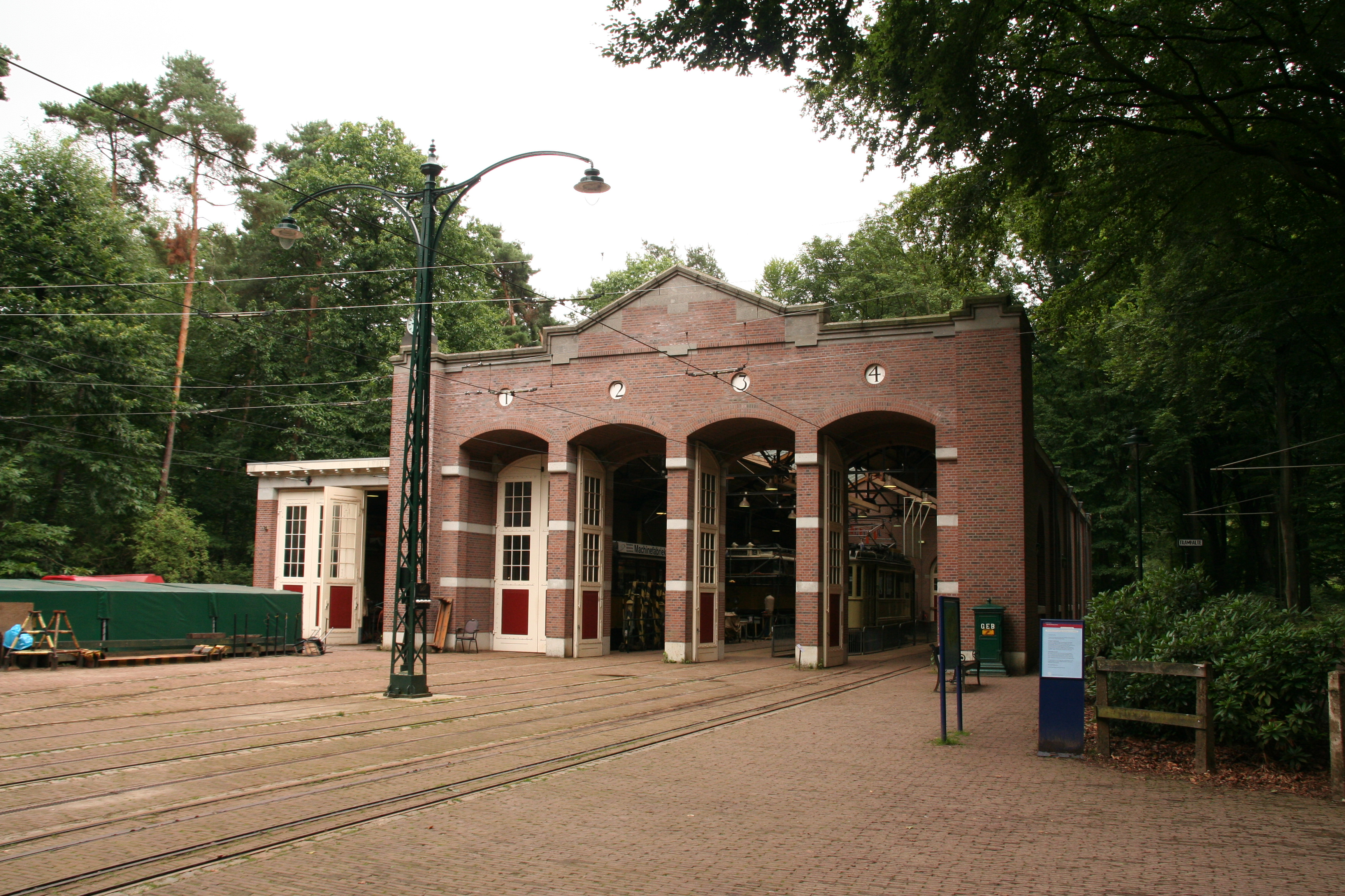 Replica uit 1996 van de in 1944 verwoeste Arnhemse Tramremise, te zien in het Nederlands Openluchtmuseum te Arnhem.